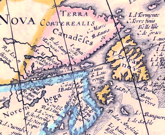 La pointe Saint-Mathieu, apparaissant sutr une carte tirée de G. Mercator et J. Hondii Atlas, 1631.